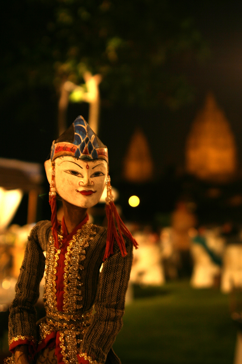 Wayang doll (puppet) in Jogjakarta, Java, Indonesia.